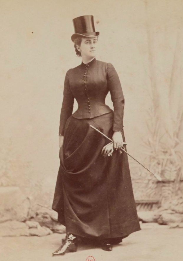 Hélène Étignard de La Faulotte, future duchesse d'Auerstaedt [Album de photographies de la famille Bocher]